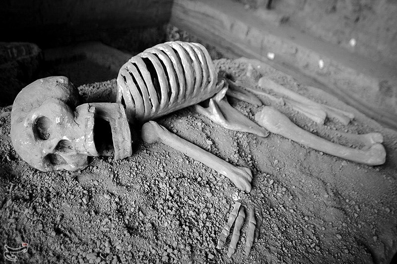 مازِرونی: گوهرتپه‌یِ شیش‌هزار ساله تمدن ِآثار